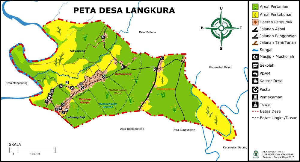 Gambar Peta Desa Langkura berdasarkan Pembagian Areal Persawahan dan Pertanian